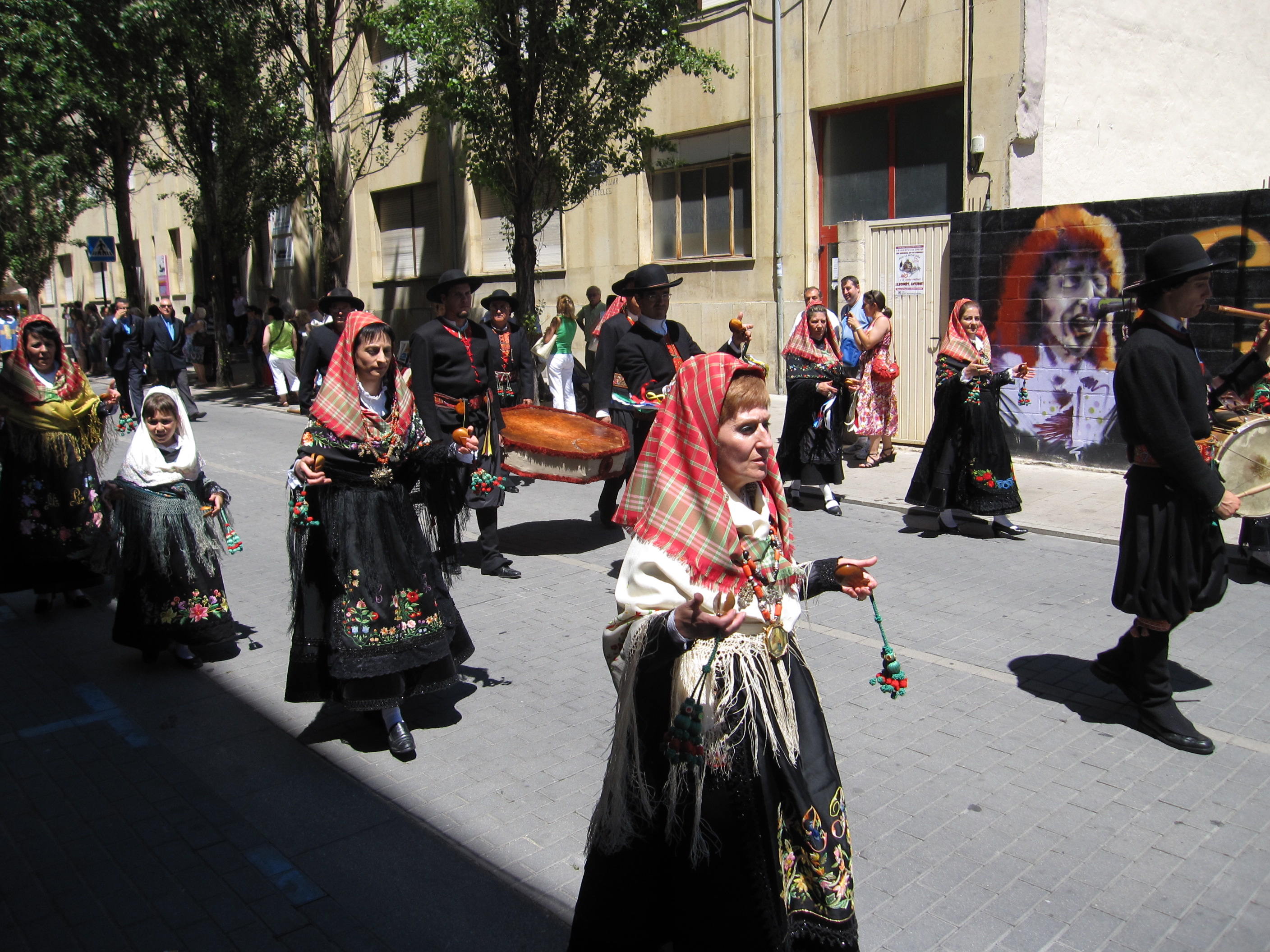 Personas vestidas con el traje tradicional maragato en Astorga (León, España)